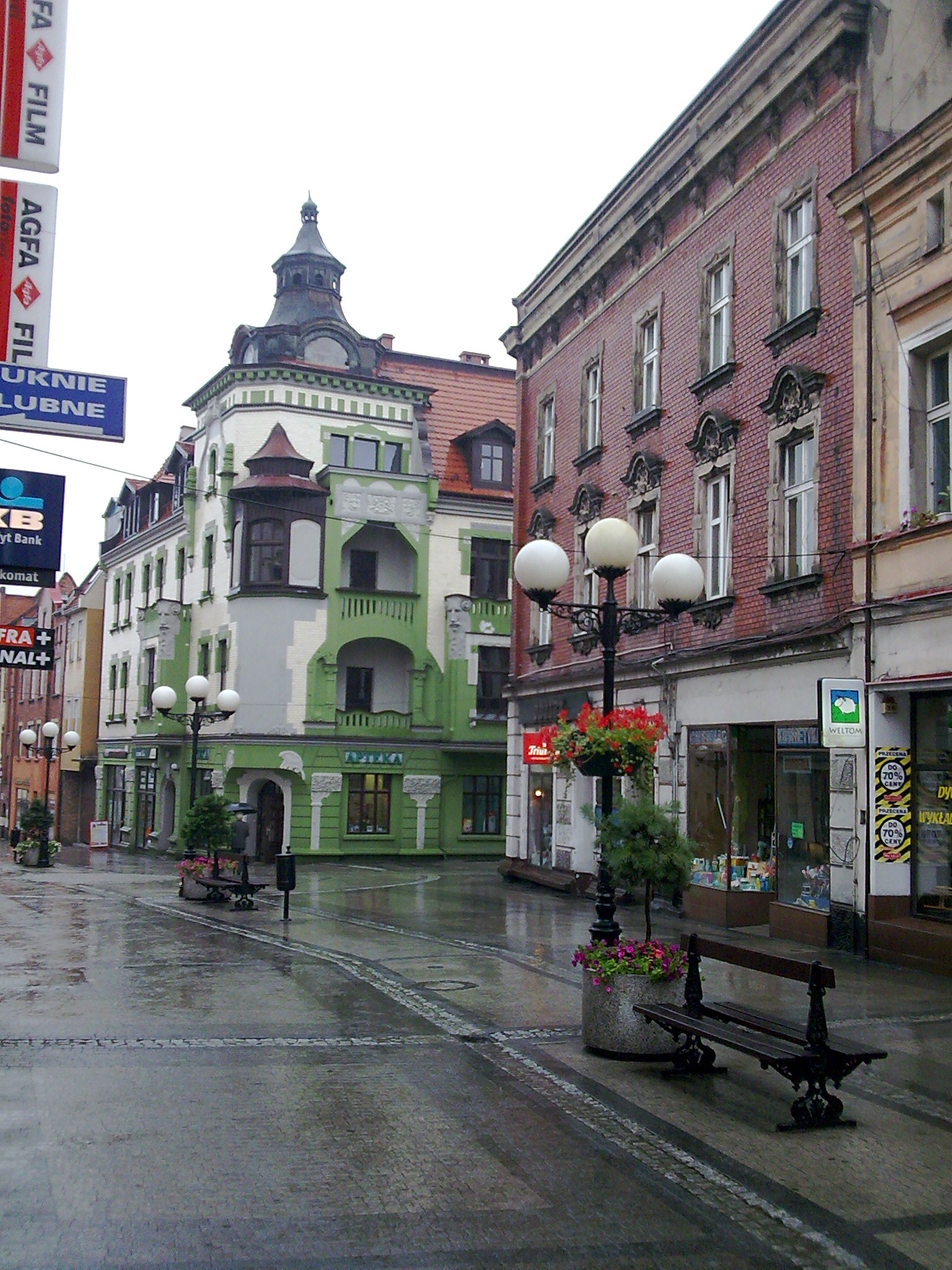 kamienice przy ul. Jana Pawła II nieopodal Rynku